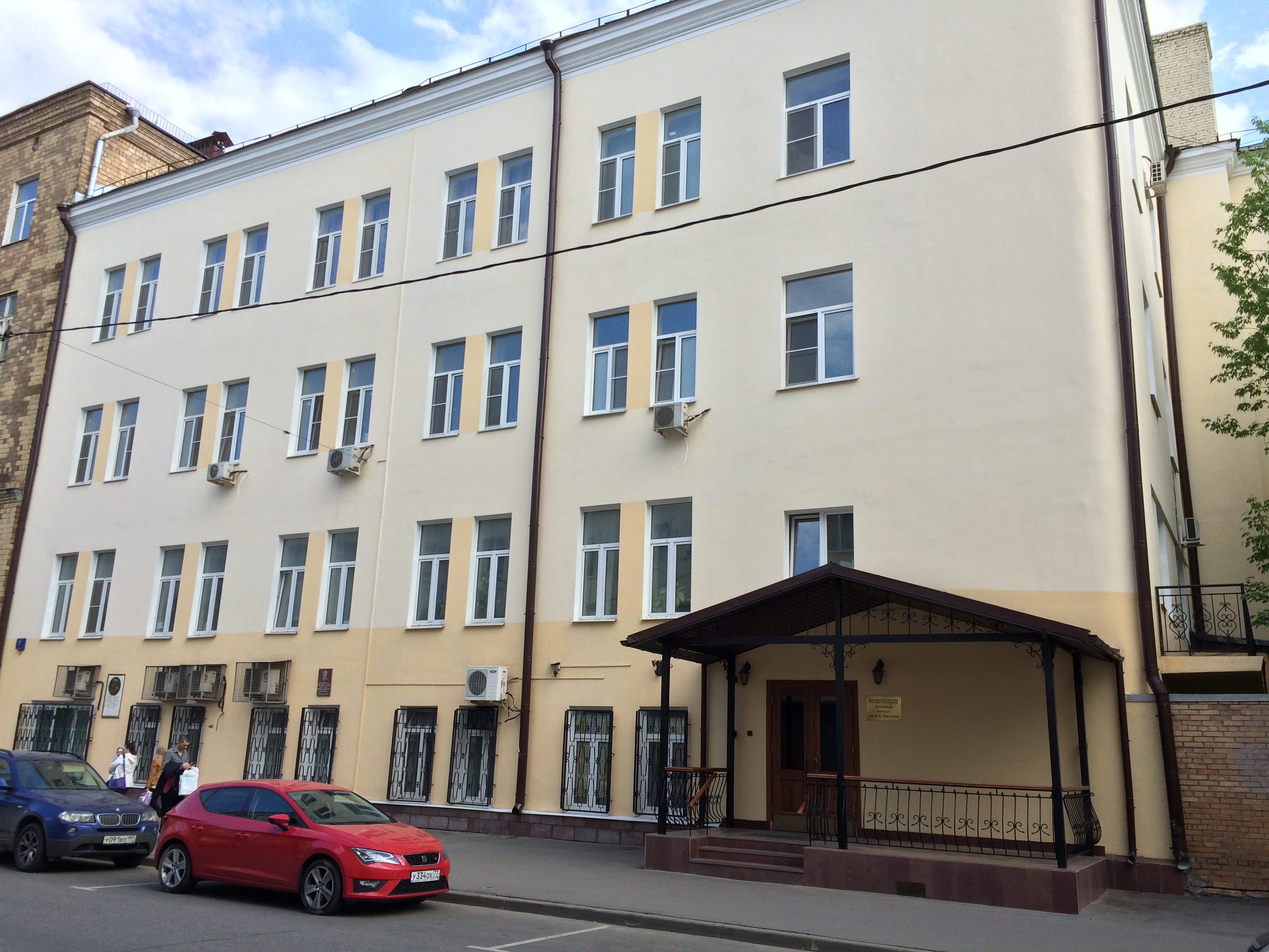 Moscow soil science institute